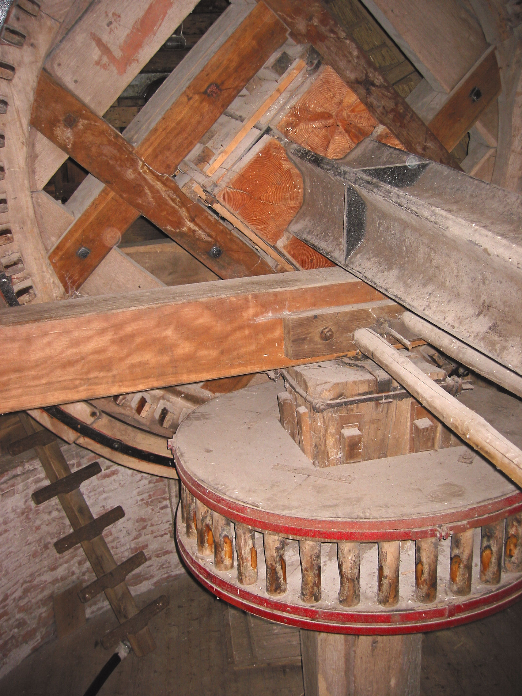 De Hoop in Garderen, bovenrondsel en bovenwiel, Gelderland, the Netherlands